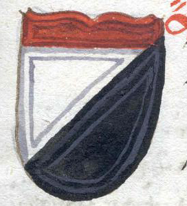 Wappen Salzburger Erzbischöfe aus der Salzburgischen Chronik bis 1587 (für frühe Bischöfe sicherlich apokryph), Universitätsbibliothek Salzburg; Eberhard III. von Neuhaus